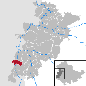 Buttlar in Thuringia - Wartburgkreis